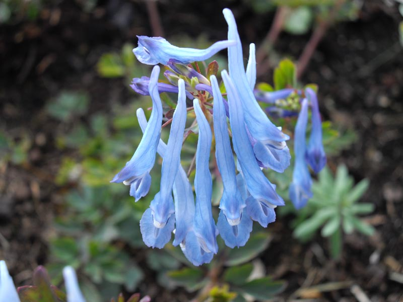 Corydalis flexuosa 'China Blue'